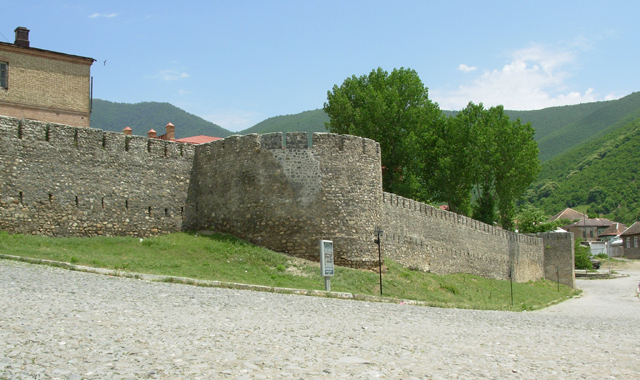 Крепость, XV в., Шеки, Азербайджан